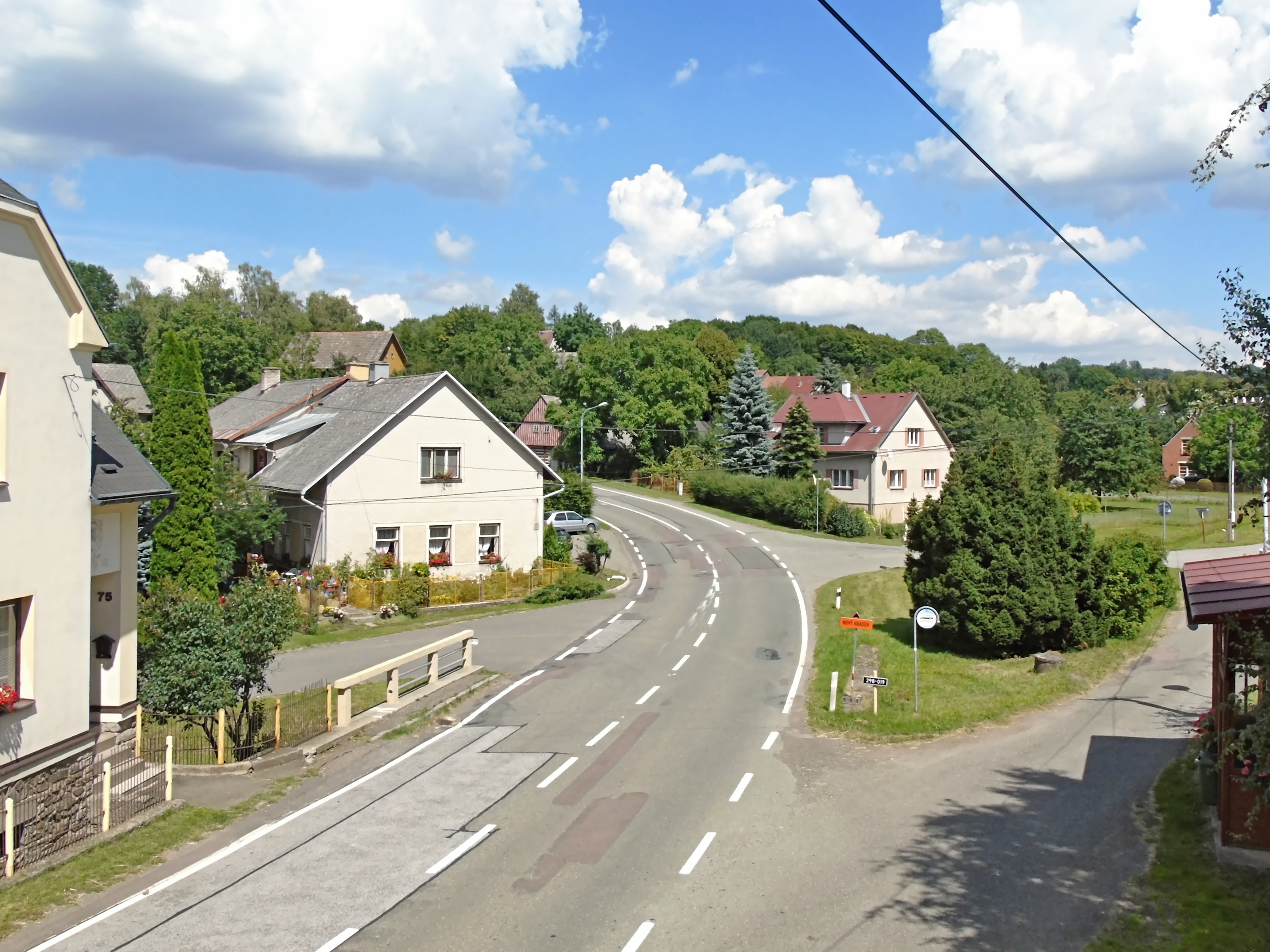 Bohdašín, obec v okrese Rychnov nad Kněžnou.